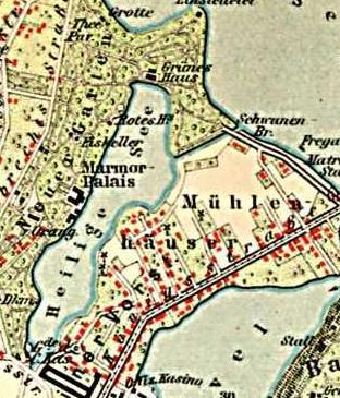 Karte Heiliger See, Potsdam Aus Karte Umgebung von Potsdam, um 1900, Maßstab 1:42.000 (Ausschnitt)